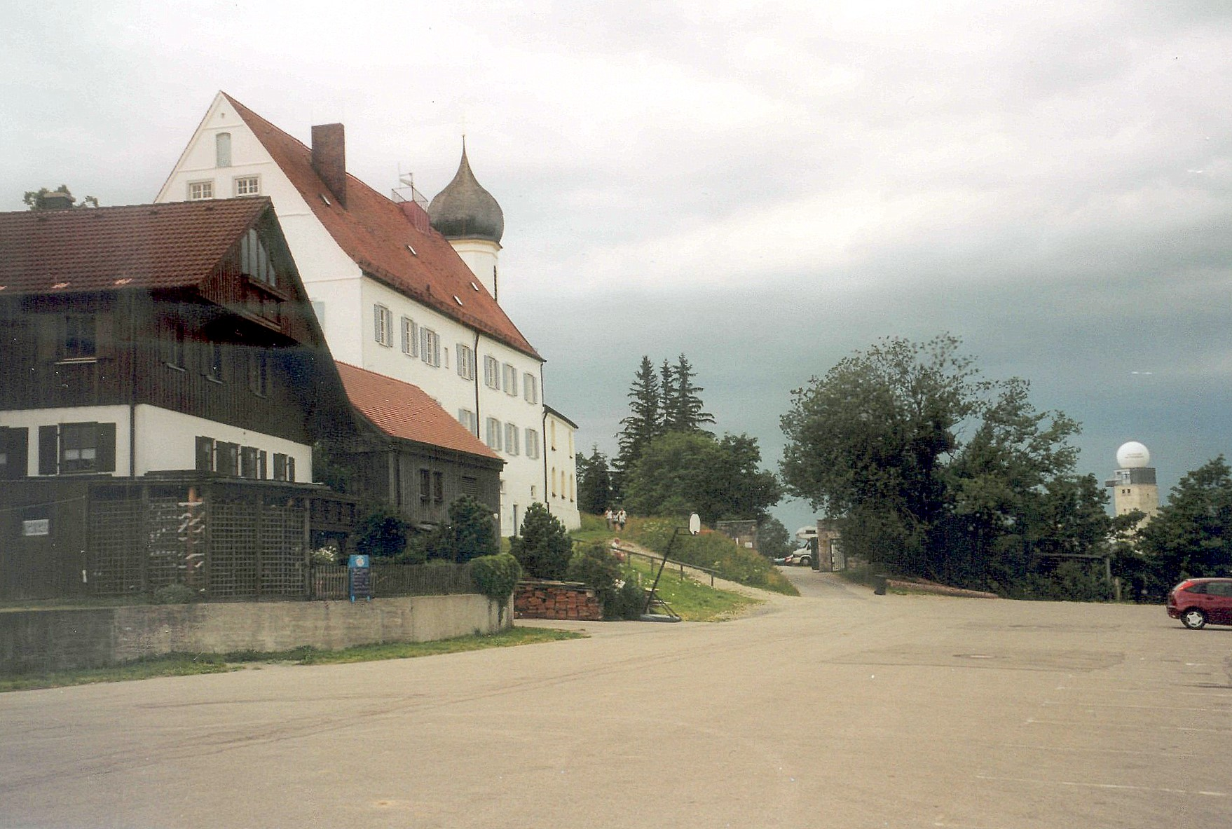 Hohenpeißenberg mit Observatorium, rechts